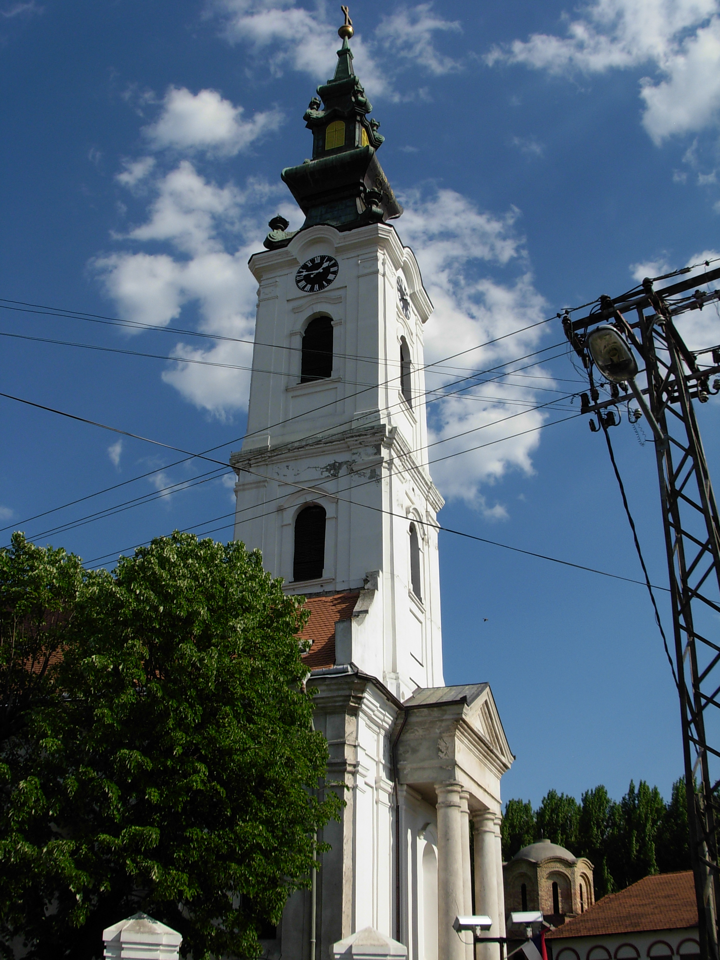 Crkva Svetog Kozme i Damjana u Futogu.